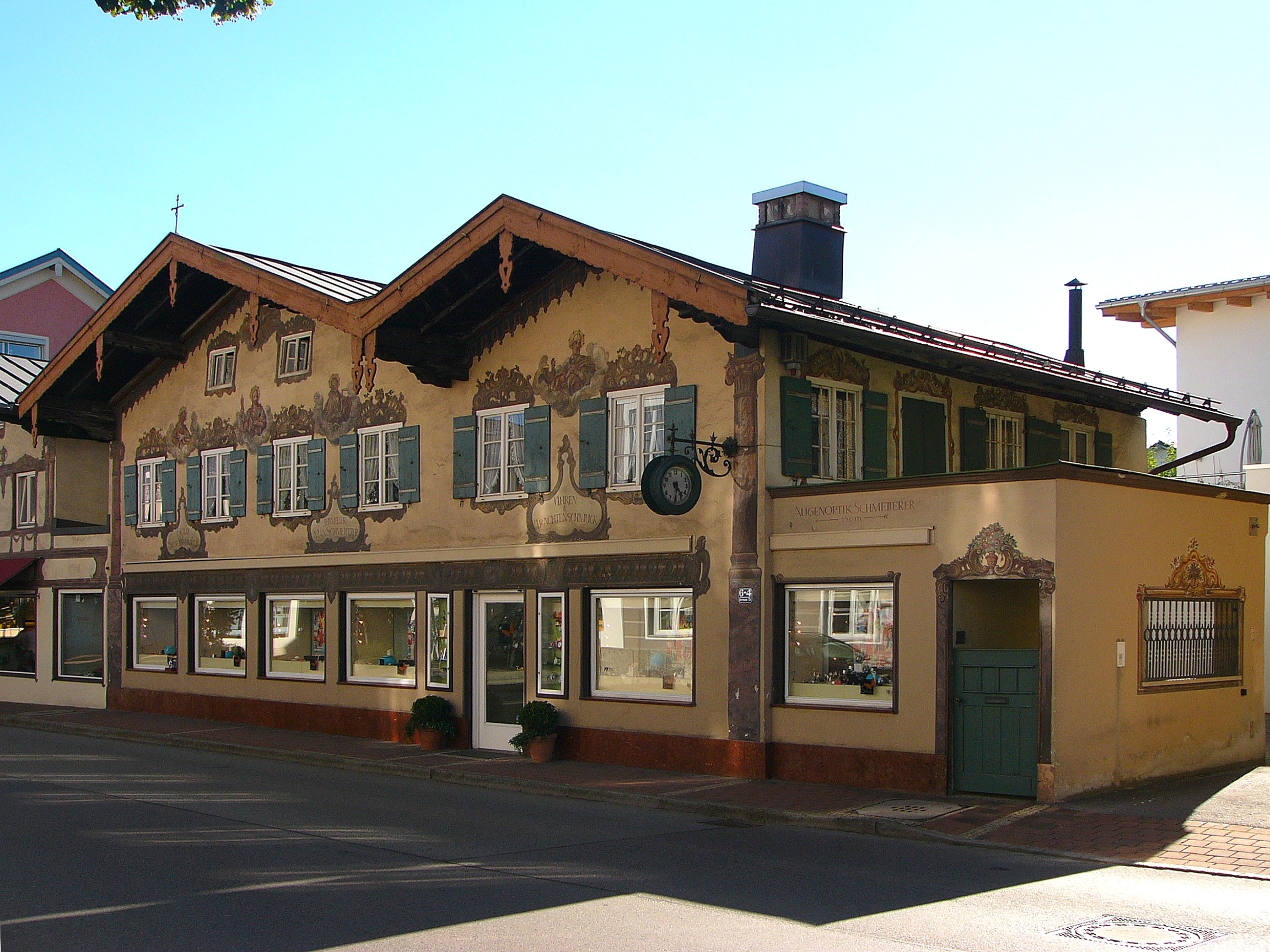 Wohnhaus; zweigeschossiges Doppelhaus mit zwei Flachdächern und Wandmalerei von 1920, südlicher Hauptteil 1782 von Franz Mayr erbaut, nördlicher Teil 1824 ergänzt.This is a photograph of an architectural monument.